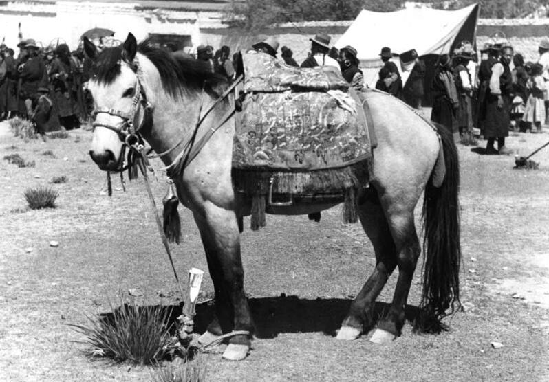 Gyantse, Volksfest (Sommerfest)